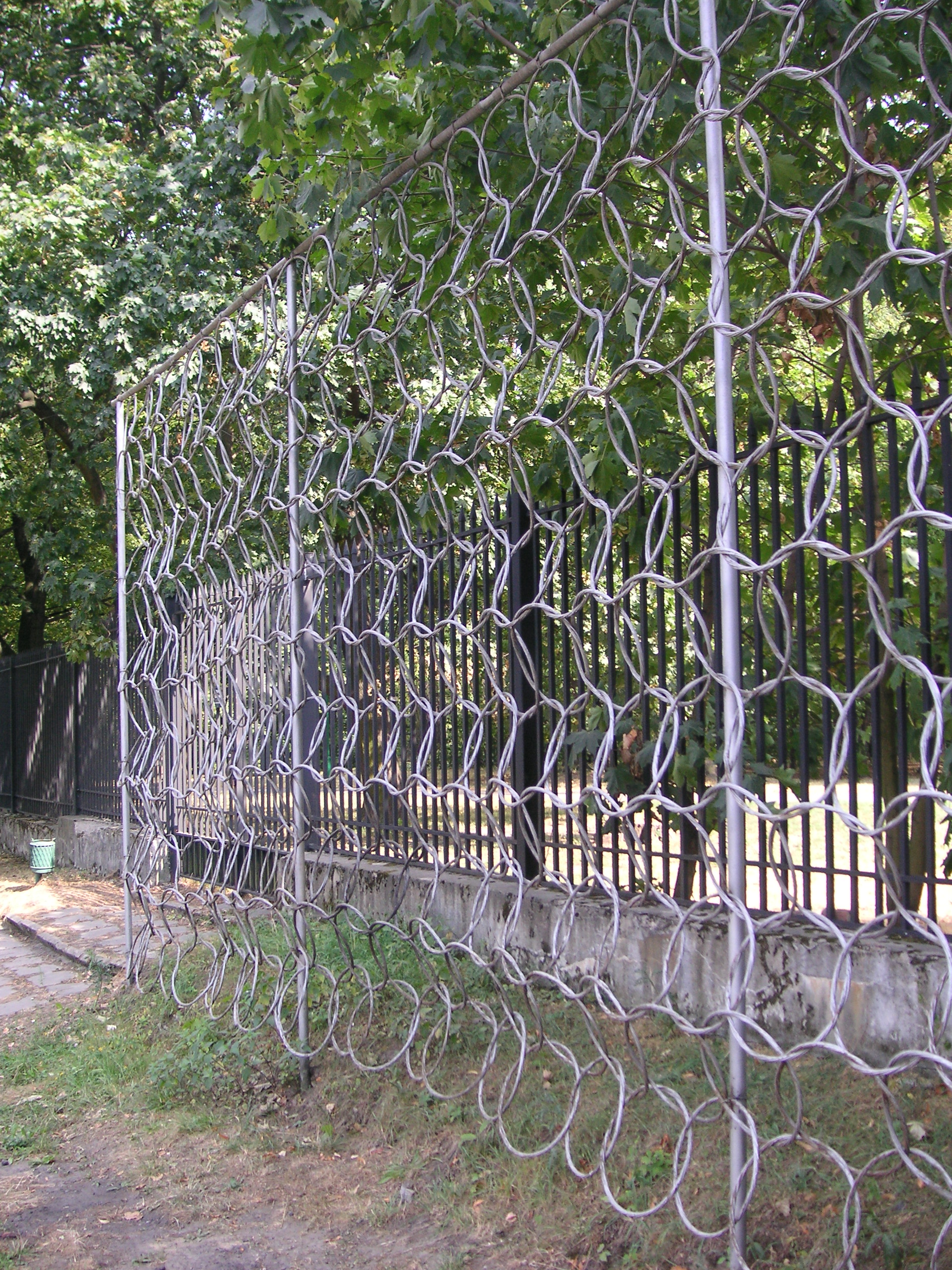 An anti-submarine net